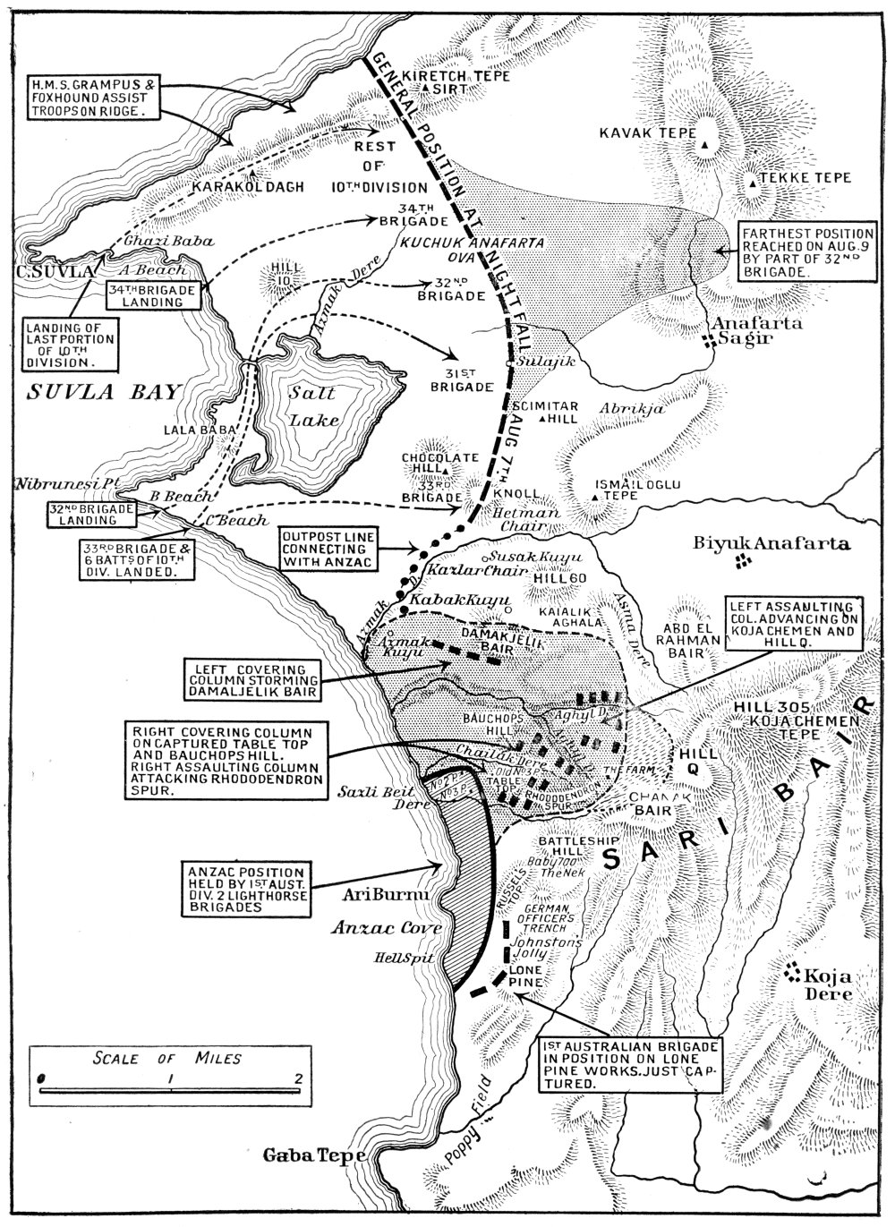 Carte en anglais de la tête de pont alliée de Gaba Tépé et de la Suvla sur la péninsule de Gallipoli en 1915.